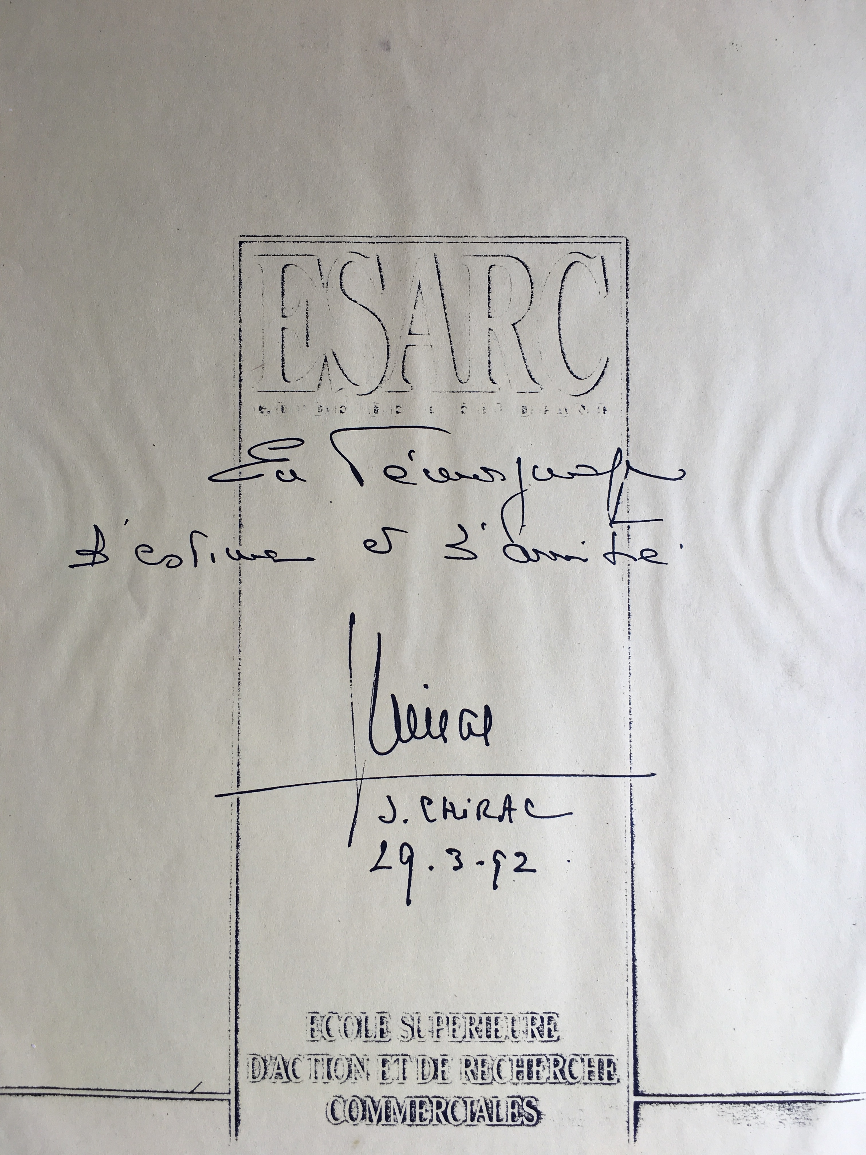 Autographe du futur président de la République française.